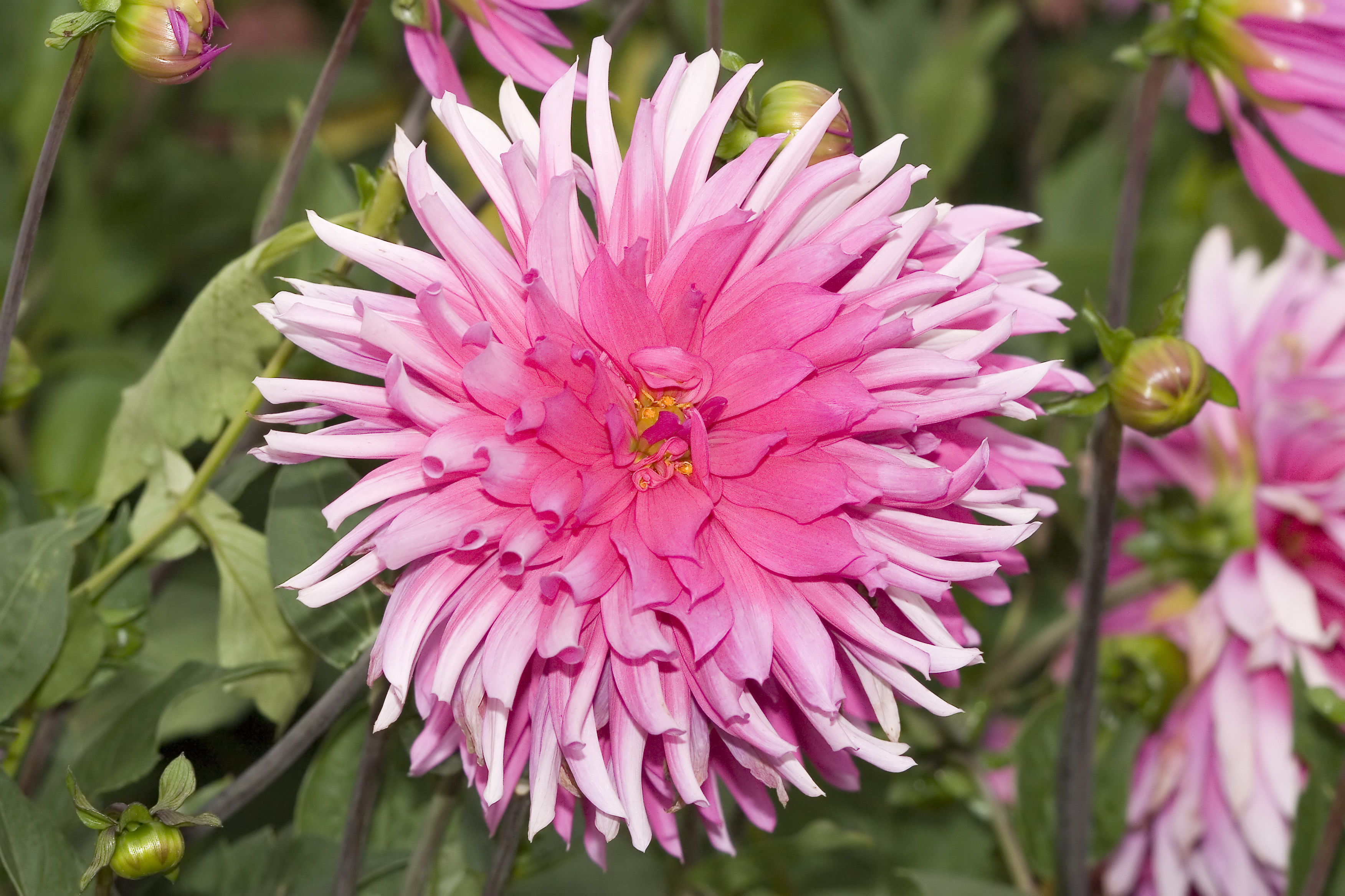 Decorative Dahlia "Erika Krause", Siegfried Engelhardt (Germany 2002) Location: Gartenbaubetrieb Engelhardt, 01809 Heidenau, Güterbahnhofstraße 53 (Saxony, Germany) 5/180L f8 Film / Speed: ISO 200 Comment: Canon Flash 580EX